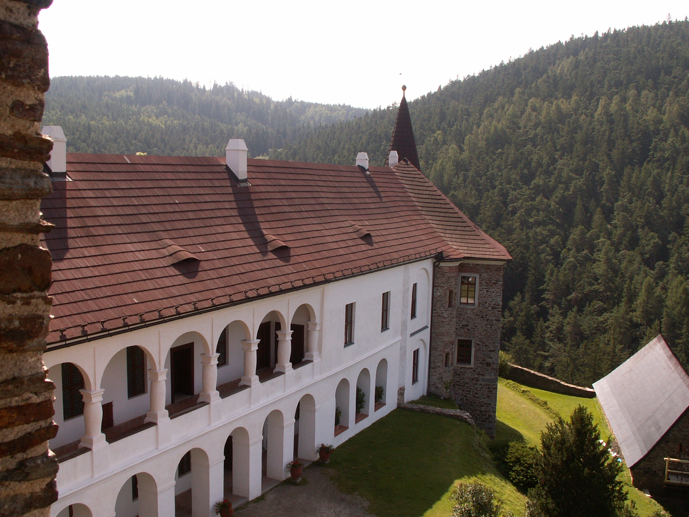 Renesanční zámecké křídlo